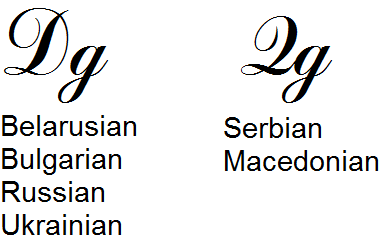 2 версии на ръкописно изписване на Д